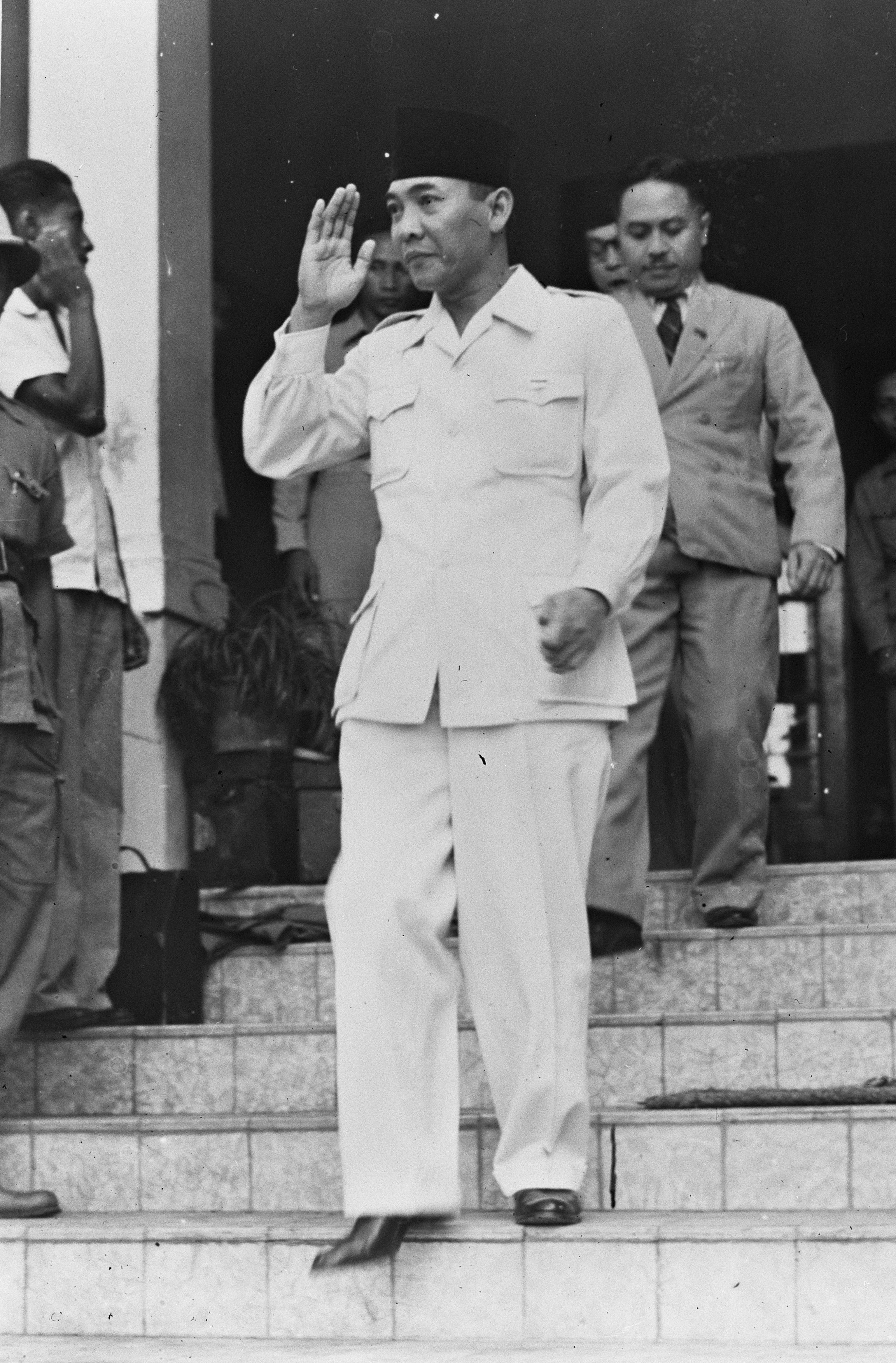 Collectie / Archief : Fotocollectie Anefo Reportage / Serie : [ onbekend ] Beschrijving : Ir. Soekarno na een bespreking met Sjahrir. Achter hem Mohammed Roem Datum : 15 november 1946 Locatie : Indonesië, Nederlands-Indië Trefwoorden : besprekingen, presidenten Persoonsnaam : Muhammed Rum, Sukarno Fotograaf : NIGIS [Netherlands Indies Government Information Service] Auteursrechthebbende : Nationaal Archief Materiaalsoort : Glasnegatief Nummer archiefinventaris : bekijk toegang 2.24.01.09 Bestanddeelnummer : 901-9576